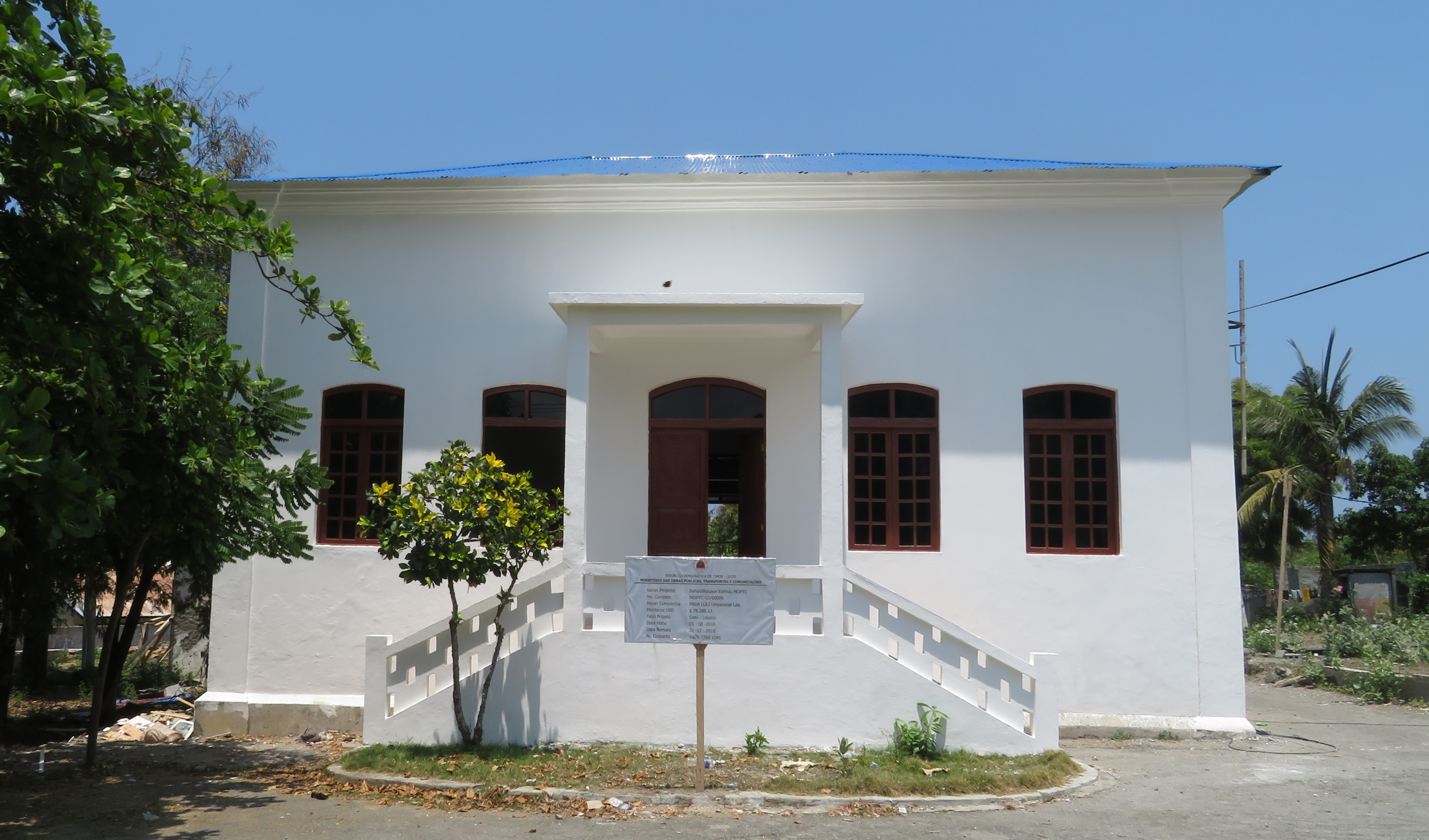 Verwaltungsgebäude (1936 erb.) des Verkehrsministeriums in Vila de Liquiçá, Dato (Liquiçá), Osttimor